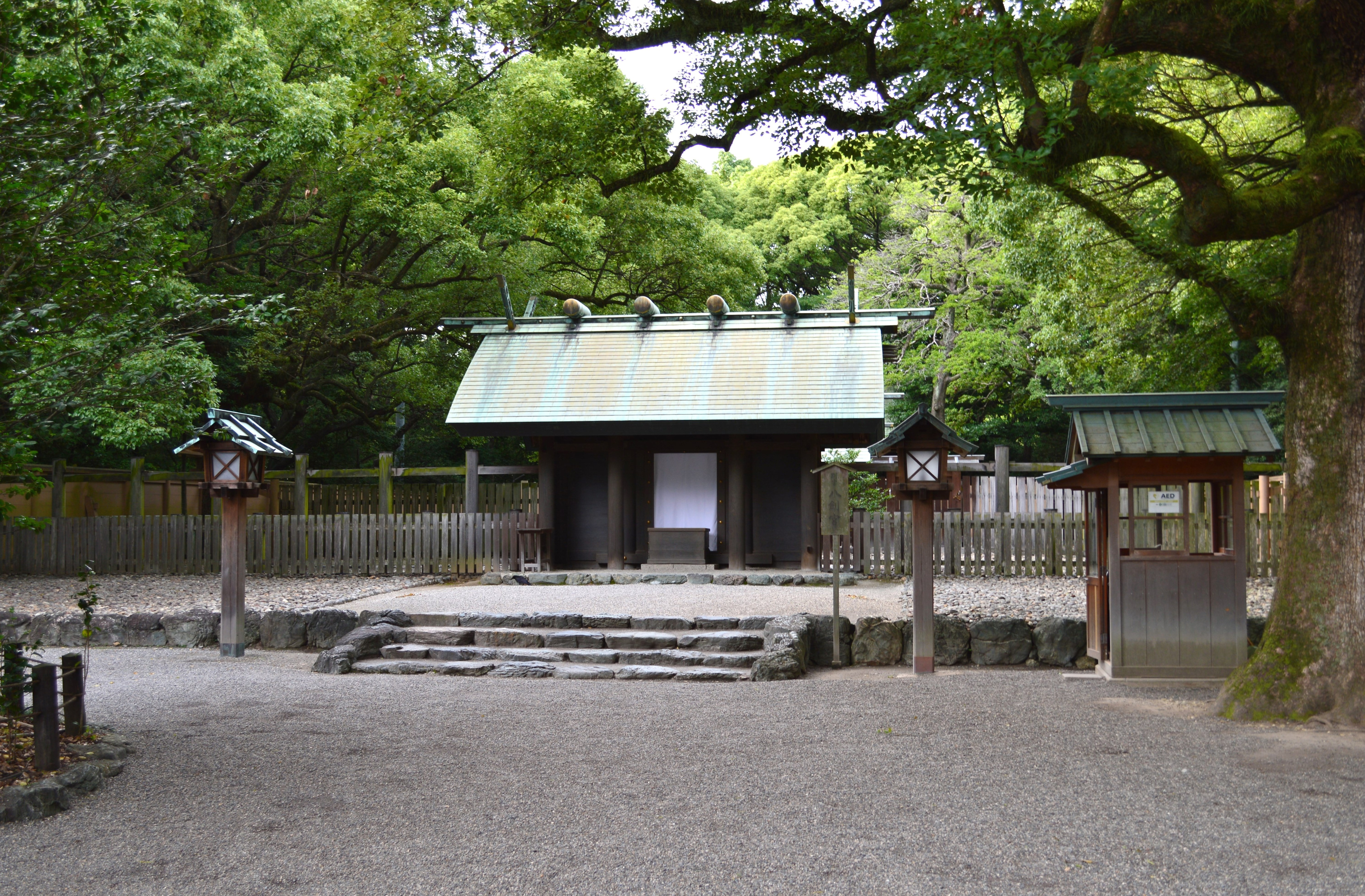 熱田神宮境内別宮 八剣宮